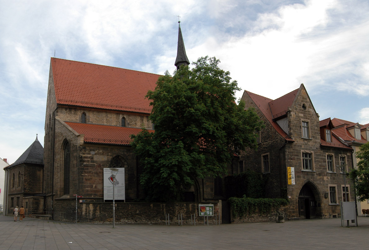 Ursulinenkloster am Anger in Erfurt